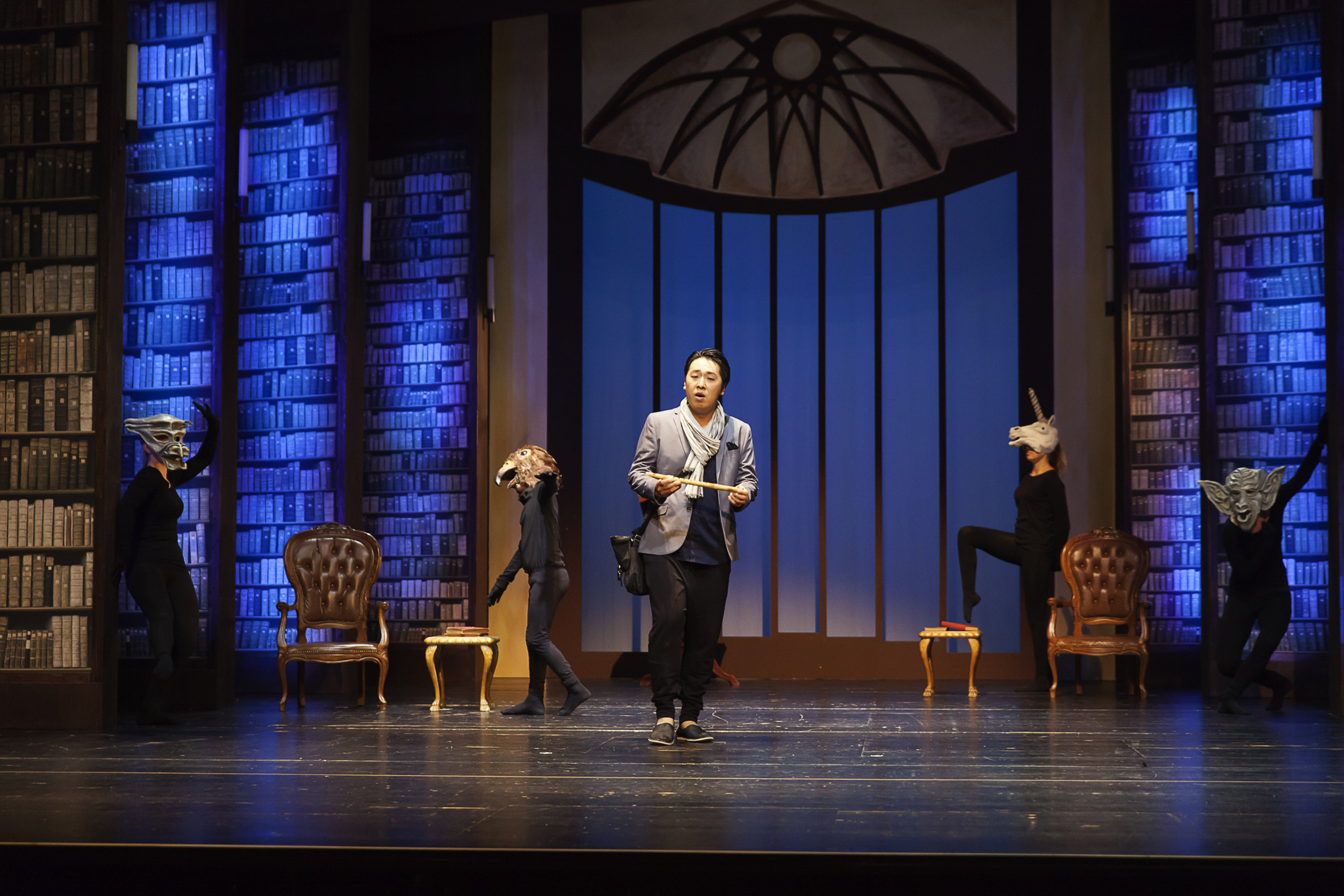 SOB15 Buehne Ensemble Feuer 07 c Thomas Bachmann